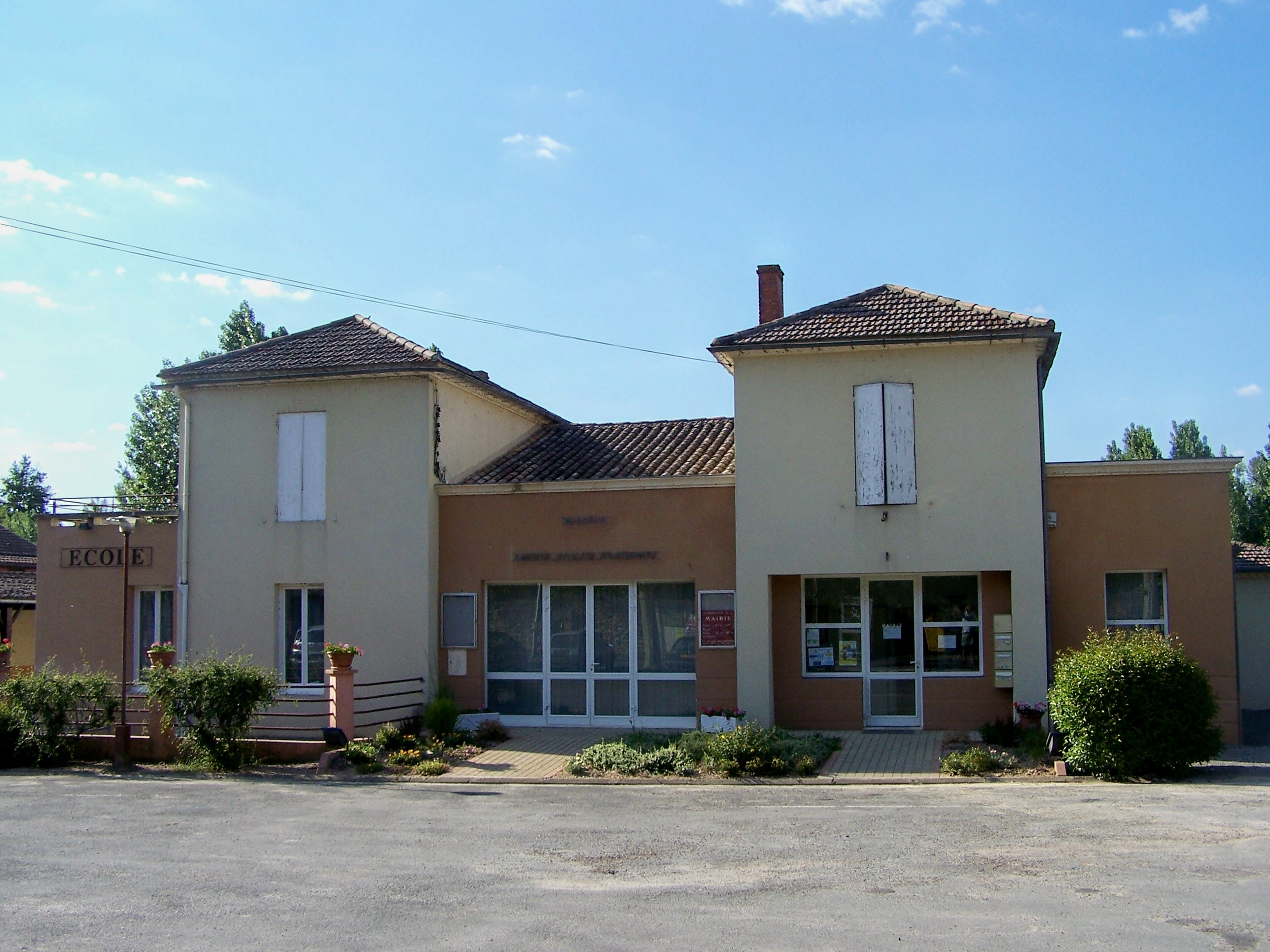 Mairie de Pondaurat, Gironde, France